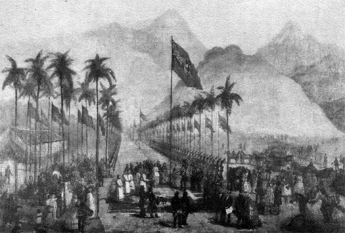 Lançamento da pedra fundamental da Estrada de Ferro Mauá, em Fragoso, Rio de Janeiro. 29 de agosto de 1852.